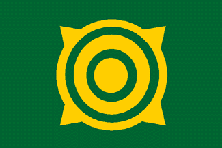 Bandera nacional jakasia